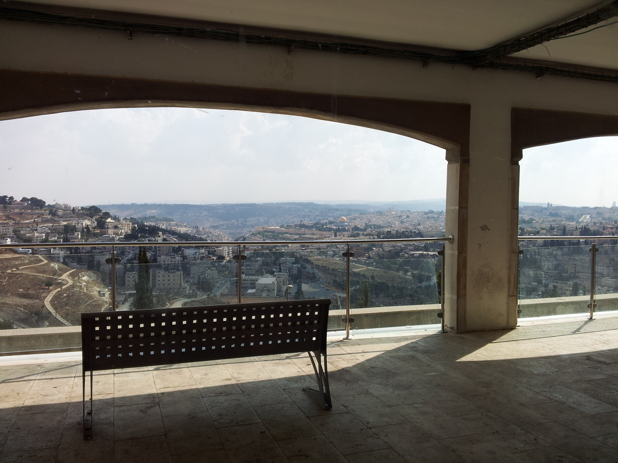 מראה בהר הצופים